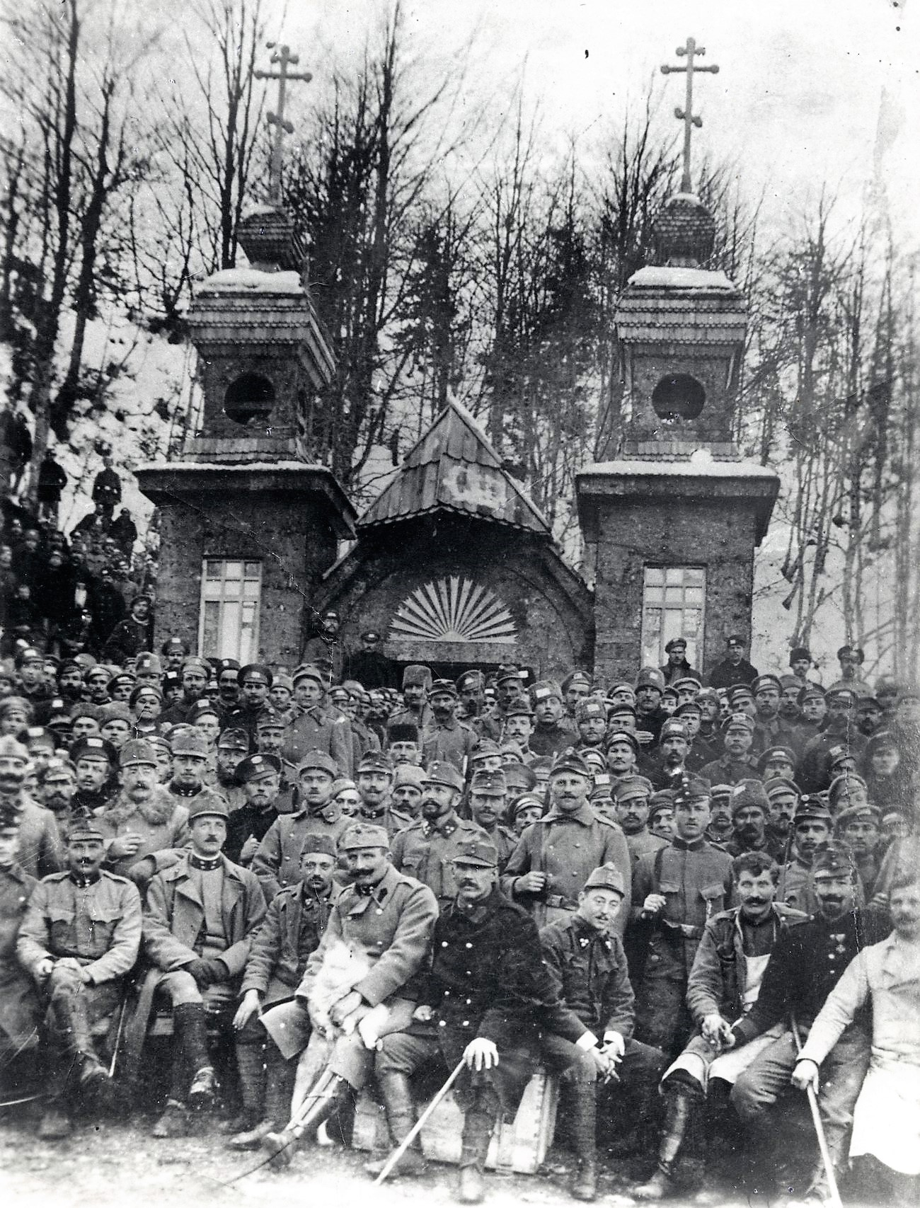 Ruski vojni ujetniki in Avstro-ogrski stražarji pred Rusko kapelico.